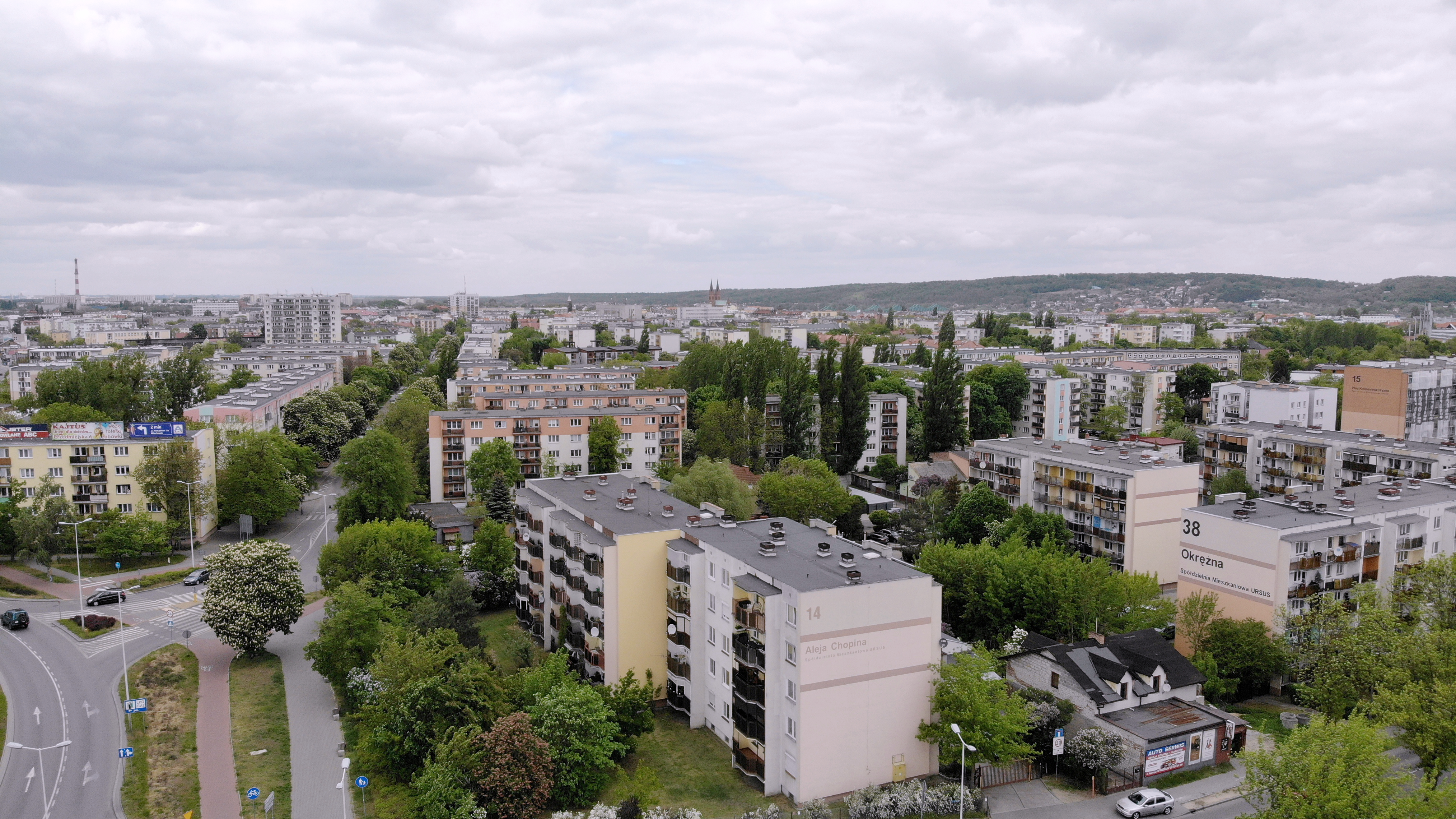 Śródmieście (2020 r.)